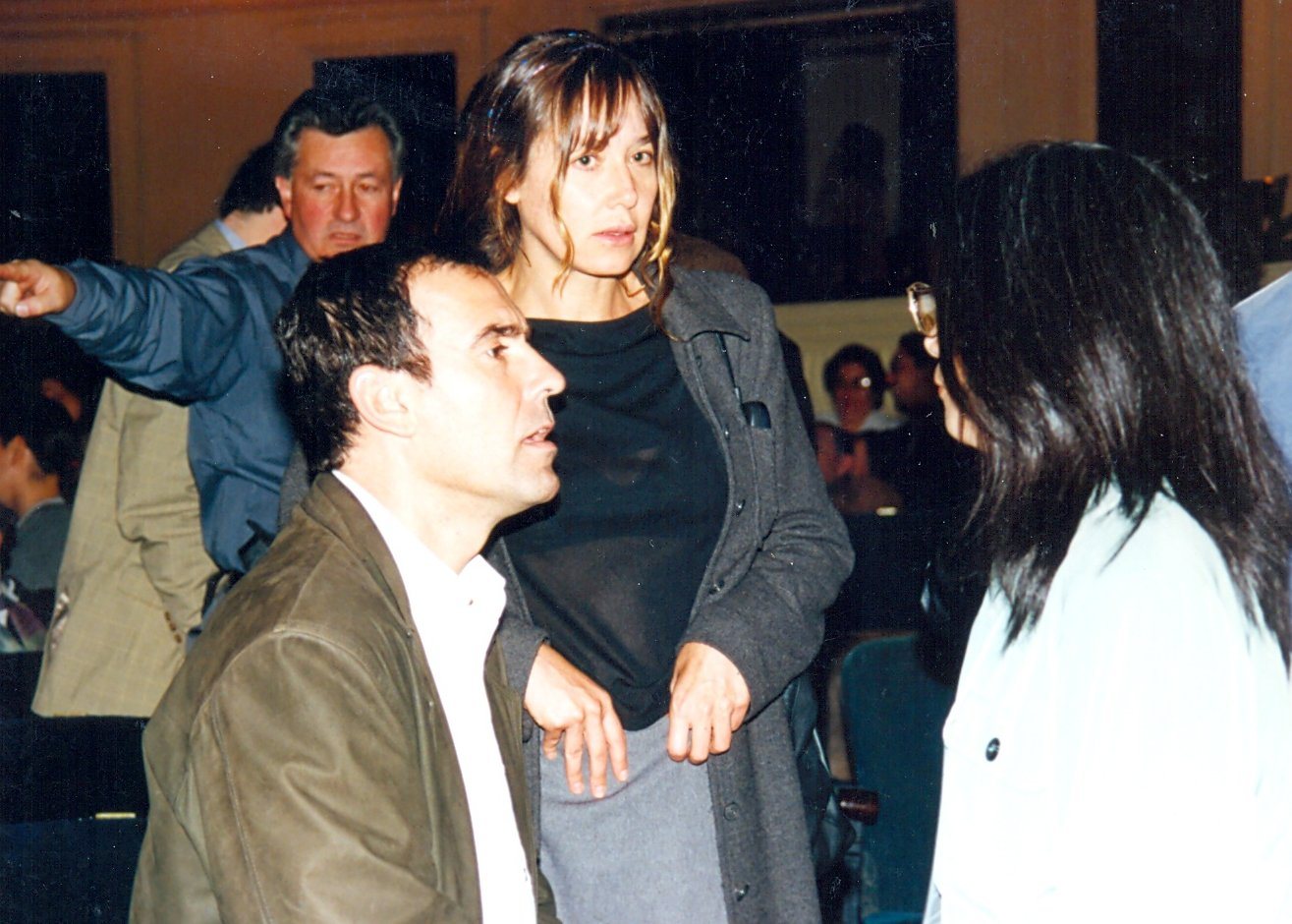 Cristian Campos, Sandra O´Ryan, Invitados especiales; año 1999